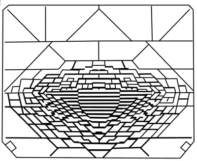 Canon AL-1 Spiegelmuster für Autofokus